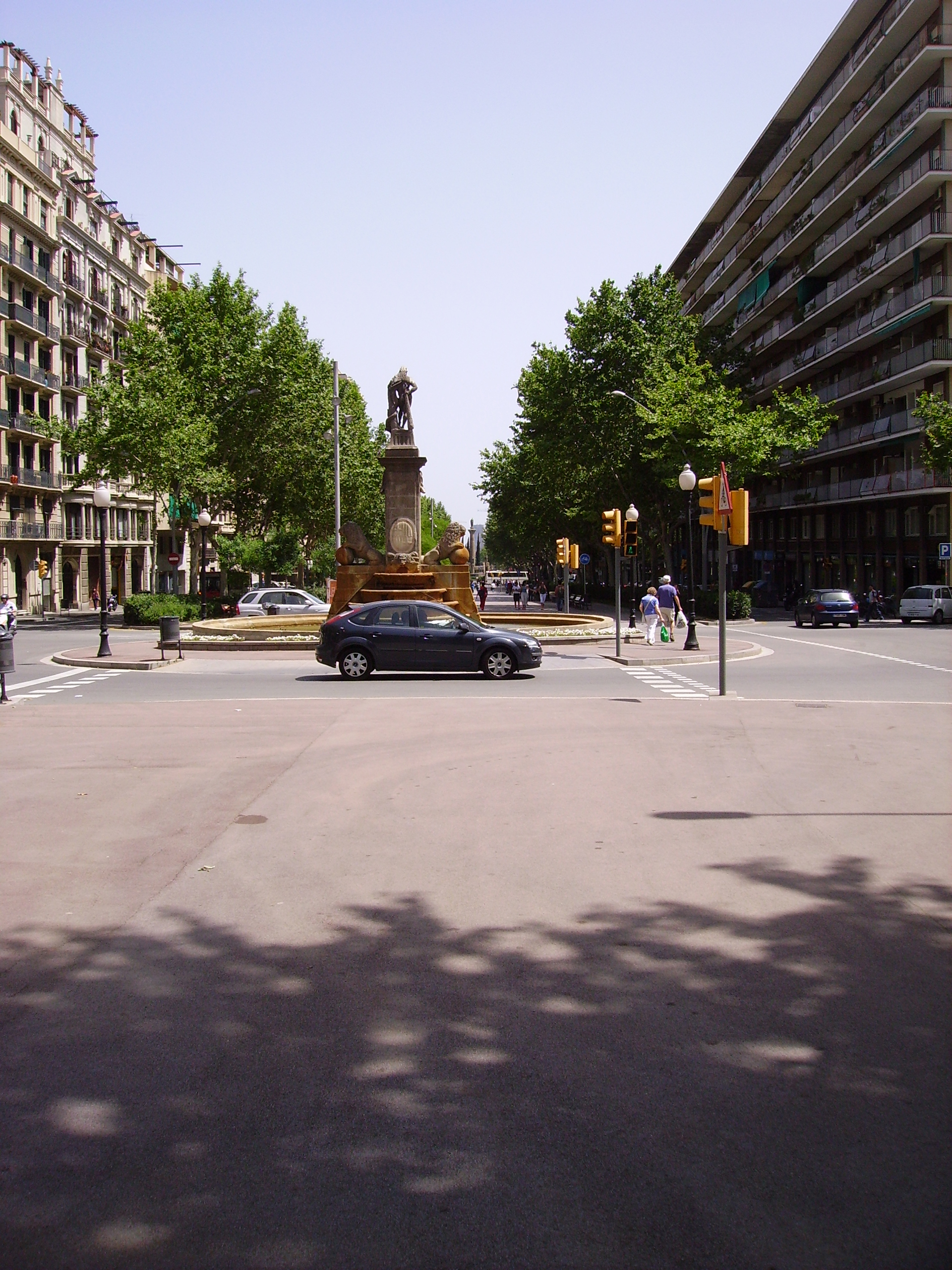 Passeig de Sant Joan, Barcelona, Catalunya.